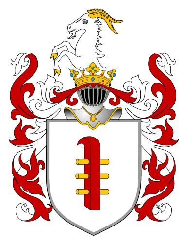 Rodový znak von Bredow